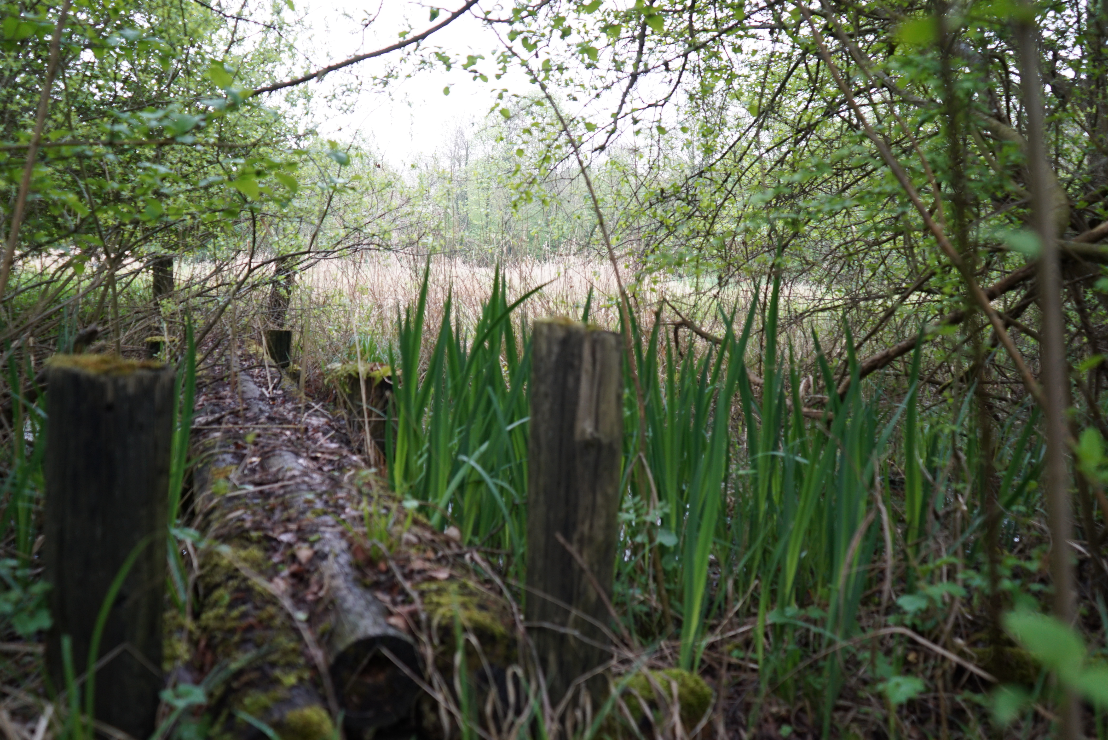 vue de la partie marais de la Réserve naturelle régionale du marais les trous de Leu.